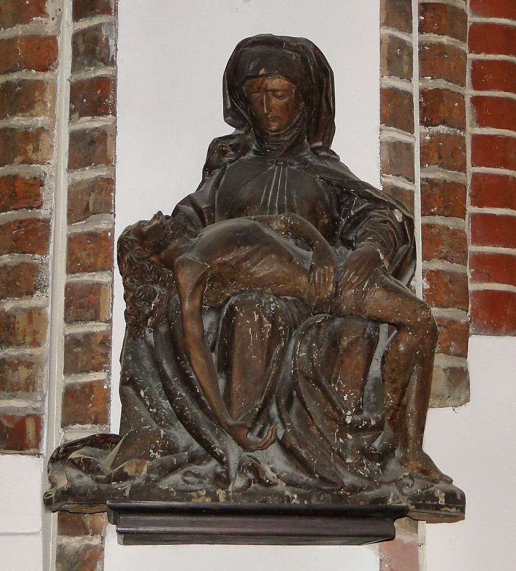 Szczecin Katedra św. Jakuba